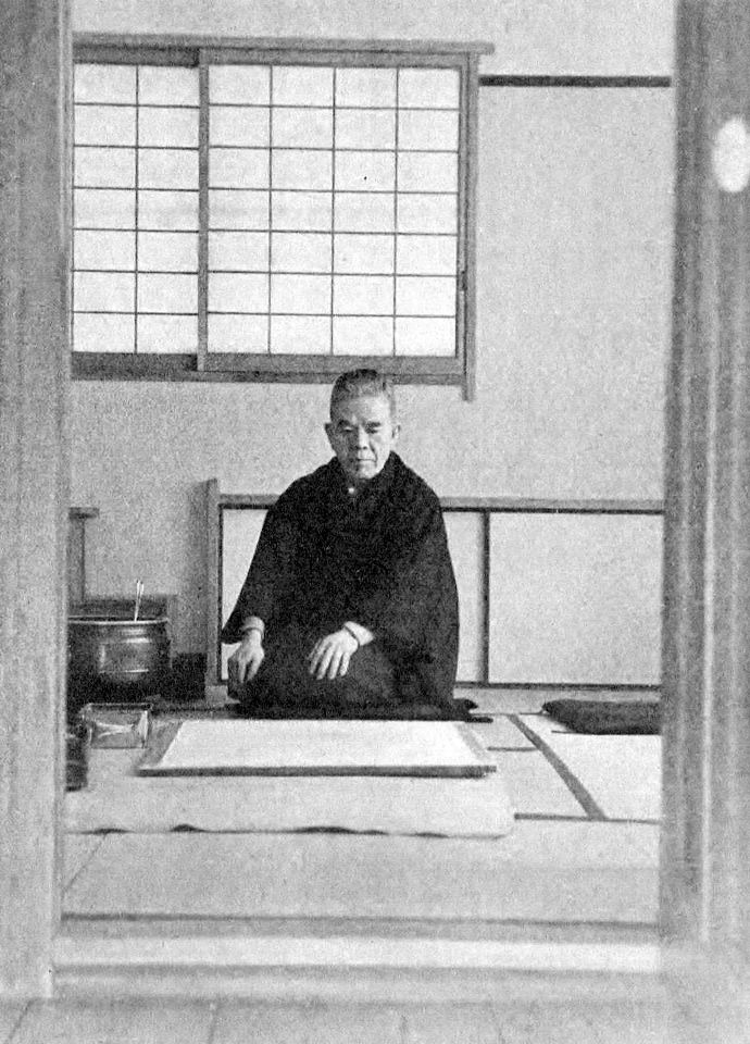 新潮社『芸術新潮』第4巻第3号（1953）より奥村土牛